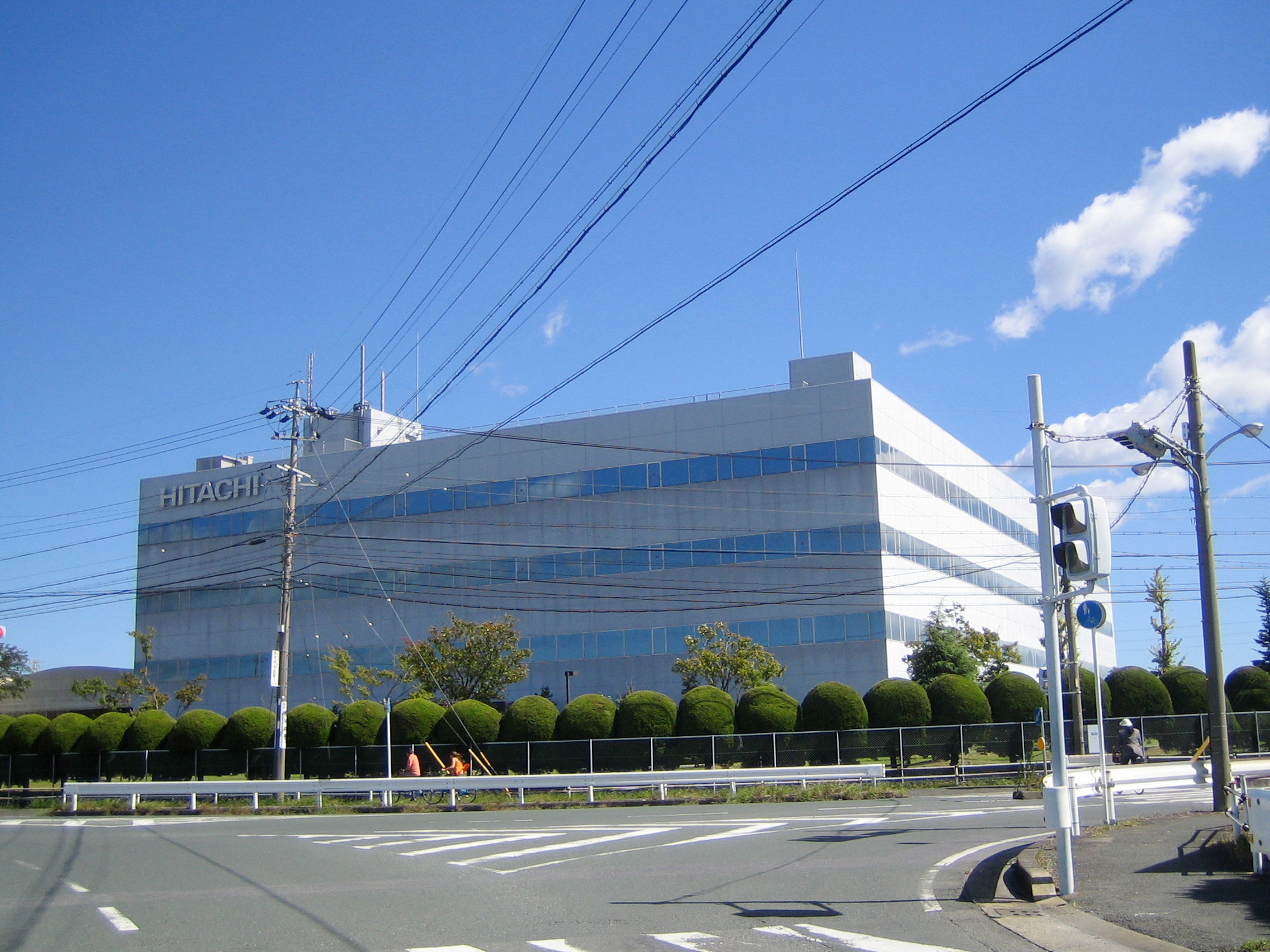 Hitachi, Ltd. (日立製作所 Hitachi Seisakusho) Toyokawa Factory, at Toyokawa, Aichi, Japan